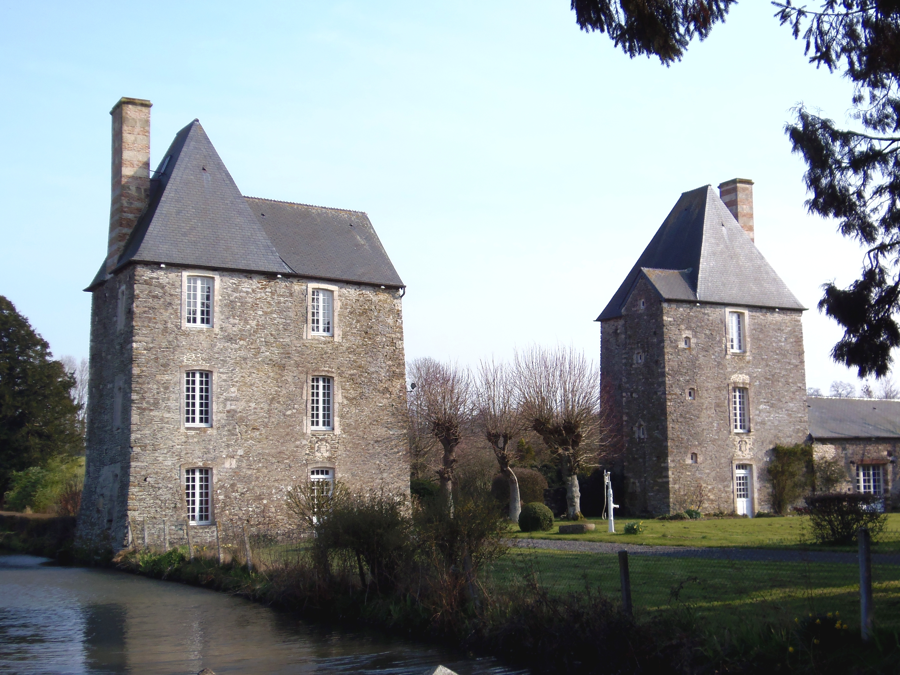 Planquery (Normandie, France). Le château.